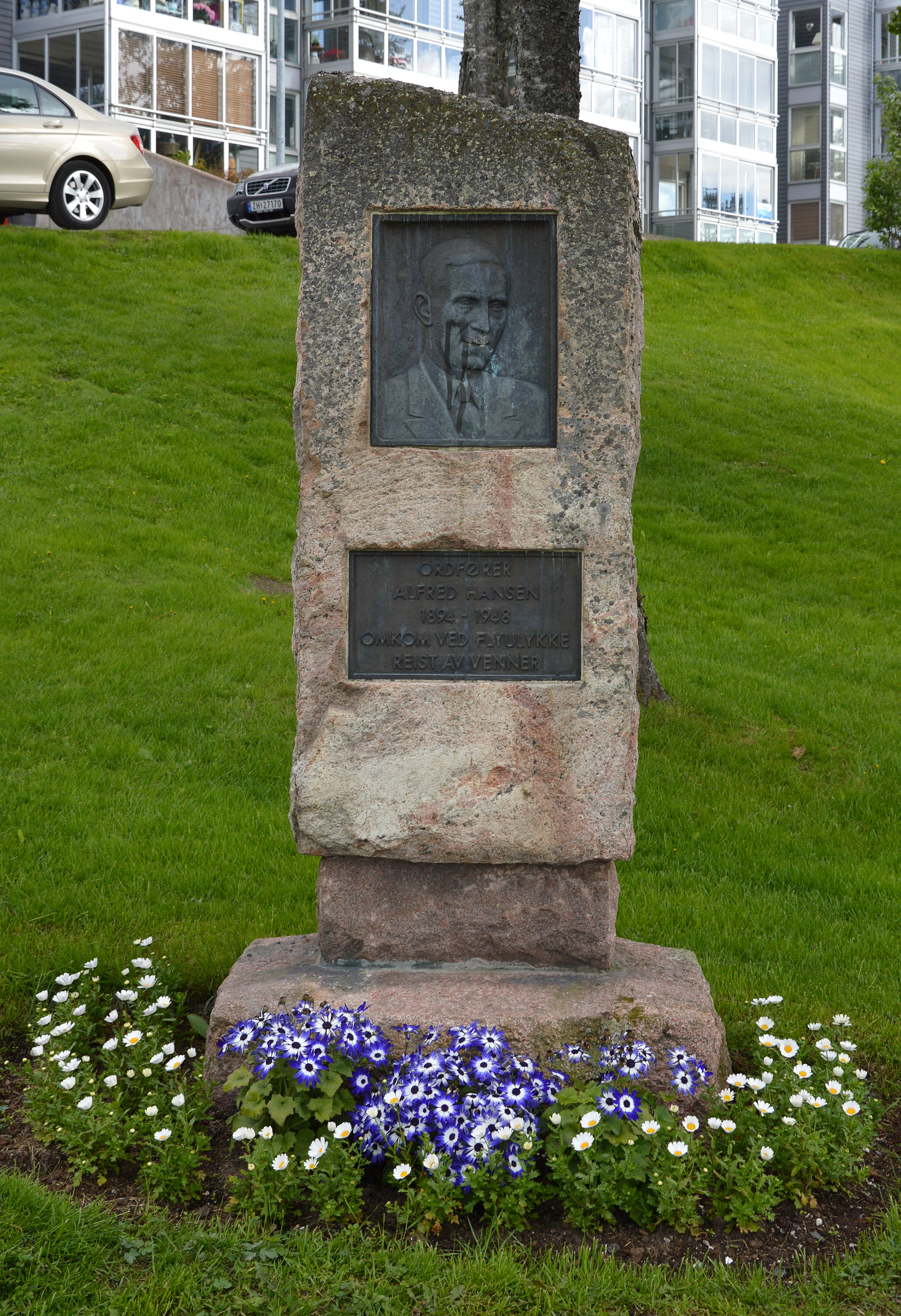 Denkmal für Alfred Hansen in Tromso